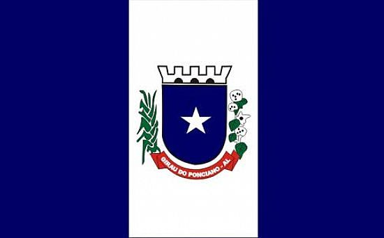 Bandeira da cidade de Girau do Ponciano - Alagoas